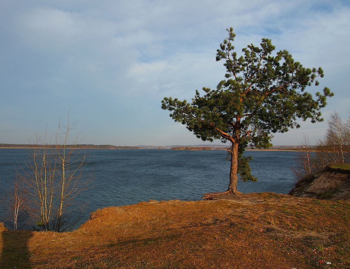 Pogoria IV, oficjalnie nazywana Zbiornikiem Kuźnica Warężyńska, to najmłodszy i największy akwen Pojezierza Dąbrowskiego. Powstał w 2005 roku jako zbiornik peksploatacyjny (popiaskowy) w dorzeczu Czarnej Przemszy. Ze względu na walory krajobrazowe całego obszaru bardziej skłonni bylibyśmy przypisać go Polsce północnej niż krainie, która zwykle kojarzy nam się tylko i wyłącznie z kopalniami.